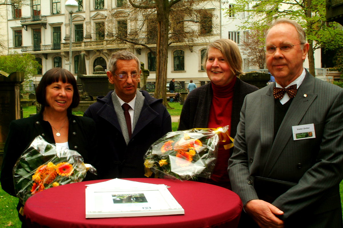 Gruppenbild auf dem Gartenfriedhof in Hannover anläßlich der Feierlichkeiten am 14. April 2012 zur Übernahme der Patenschaft für das Grabmal des königlichen Hofmalers Johann Heinrich Ramberg (1763-1840) durch seinen Ur-Ur-Ur-Enkel Jürgen Behrens; von links: Ingeborg Rupprecht (stellvertretende Vorsitze des gemeinnützigen Vereins Renaissance Gartenfriedhof e.V, der Pate Jürgen Behrens, die Historikerin Alheidis von Rohr sowie der Erste Vorsitzende von Renaissance Gartenfriedhof, Landessuperintendent a. D. Dieter Zinßer.